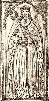 Náhrobní deska Ingeborg Dánské